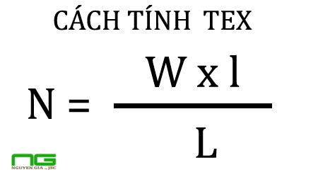 Calculate Tex